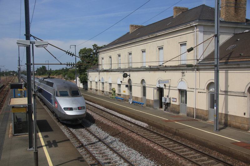 Bâtiment voyageur de la gare de La Possonnière